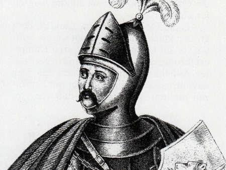 Magnus Torquatus, Herzog von Braunschweig-Lüneburg